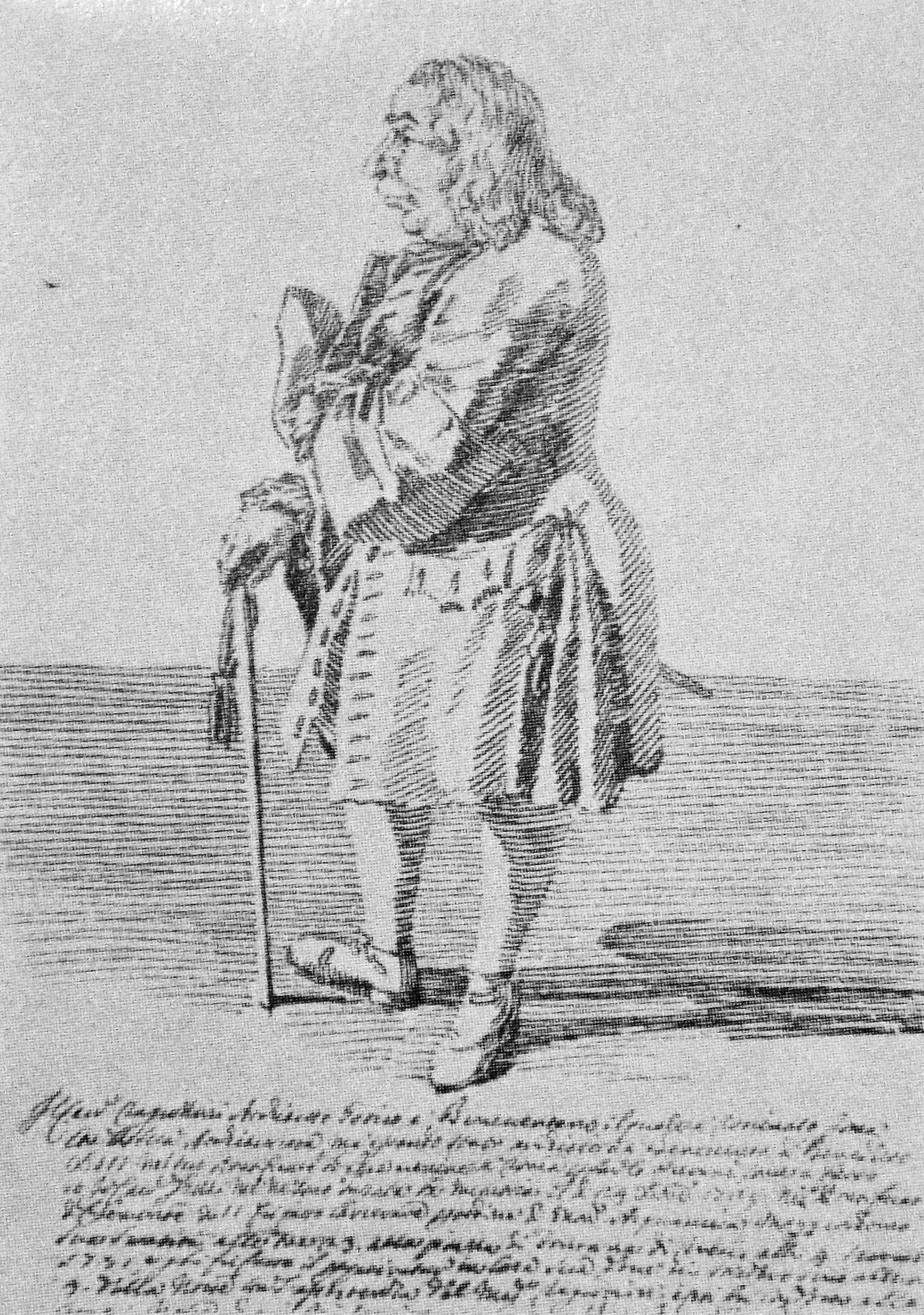 Pier Leone Ghezzi, Caricatura di Filippo Raguzzini. Biblioteca Apostolica Vaticana, Cod. Ottobr. 3116, fol. 179